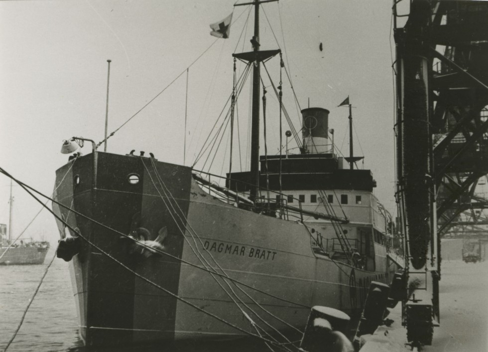 schip in haven: Dagmar Bratt; zjr. Bevrijding-militairen. Op 28 januari 1945, liep het stoomschip 'Dagmar Bratt' onder gezagvoerder Eric Kornelius Jönsson de haven van Delfzijl binnen. Het schip was vier dagen eerder uit de Zweedse haven Trelleborg vertrokken en voerde rond 2000 ton voedsel en medicamenten aan.